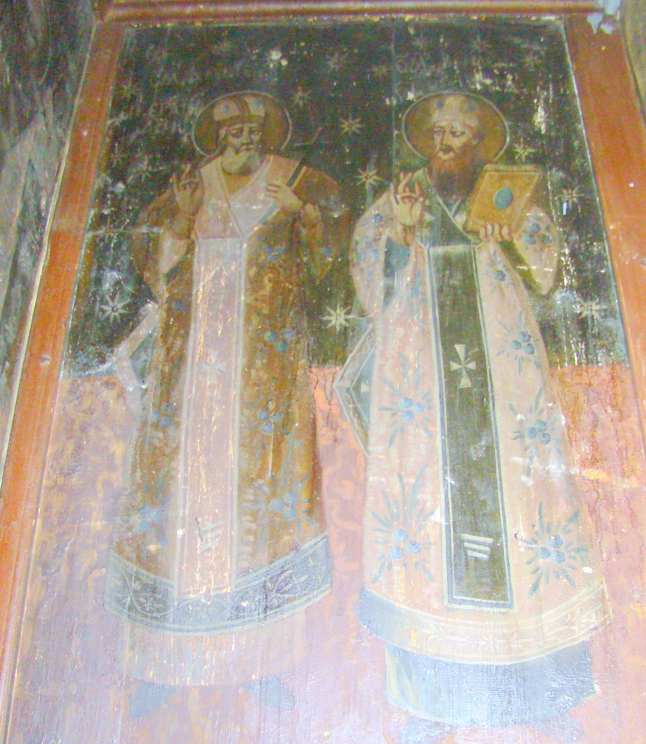 Mănăstirea Dălhăuți, Vrancea